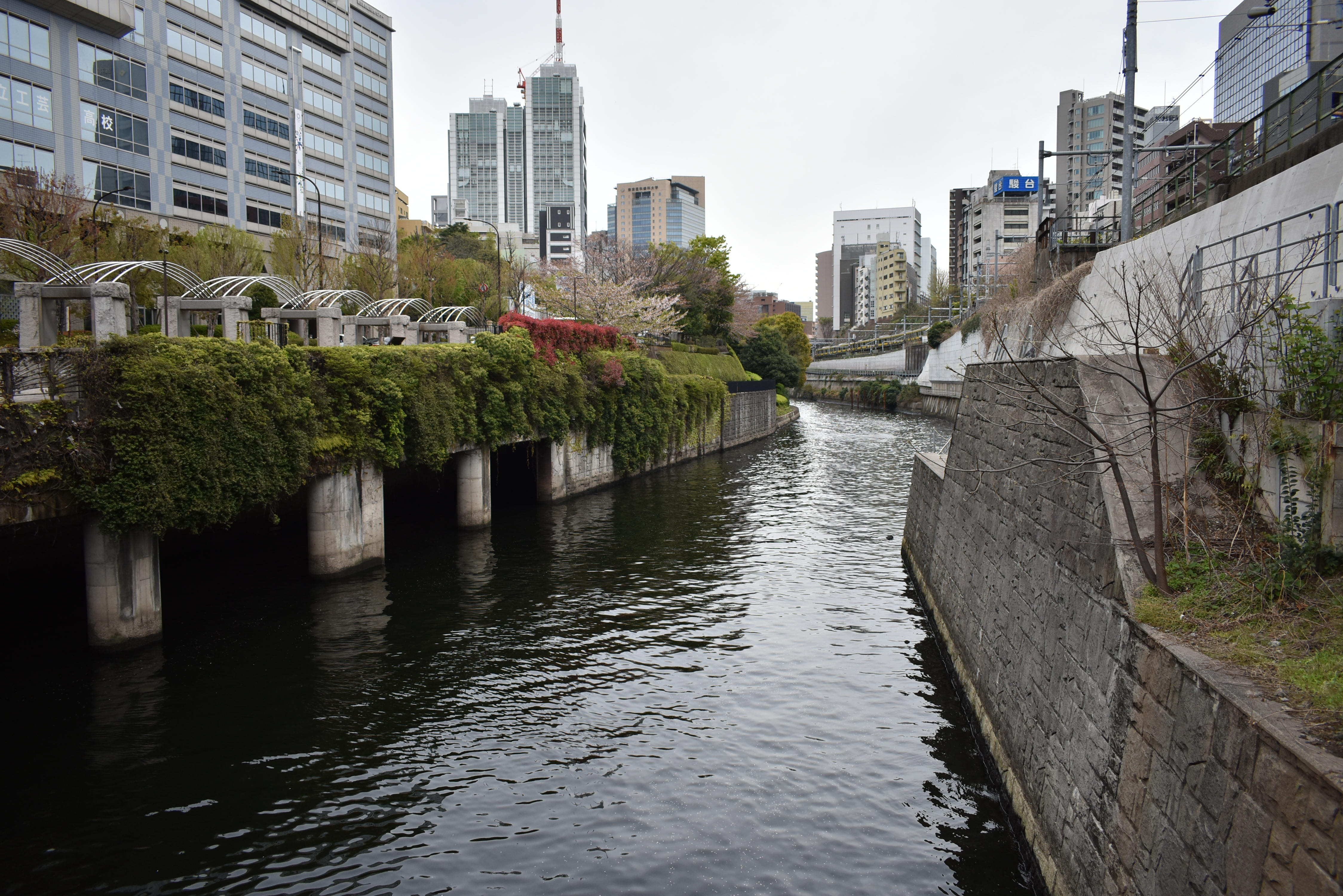 水道橋 神田川 Nikon D3400